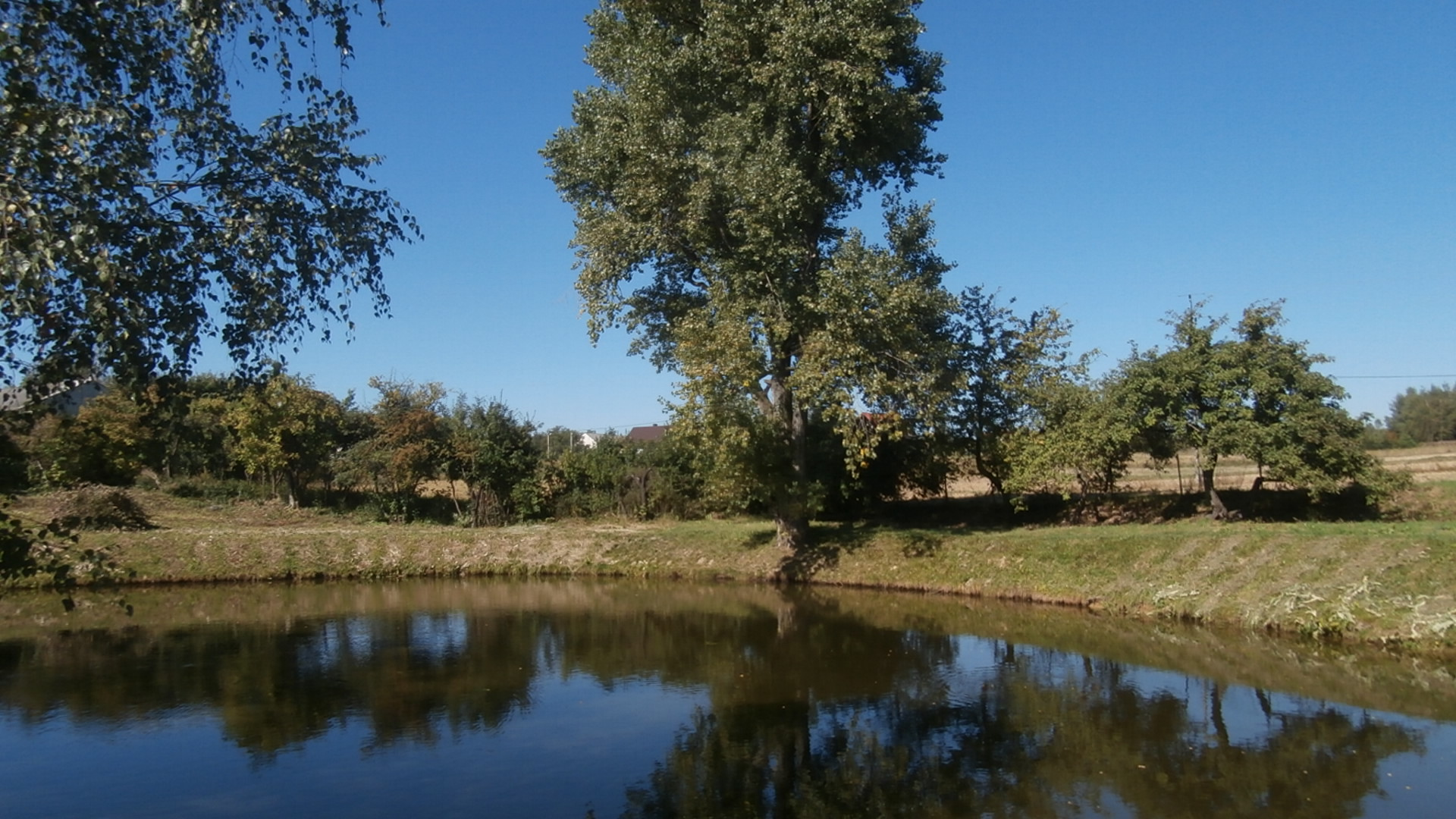 Staw w centrum wsi Czajowice (województwo małopolskie)